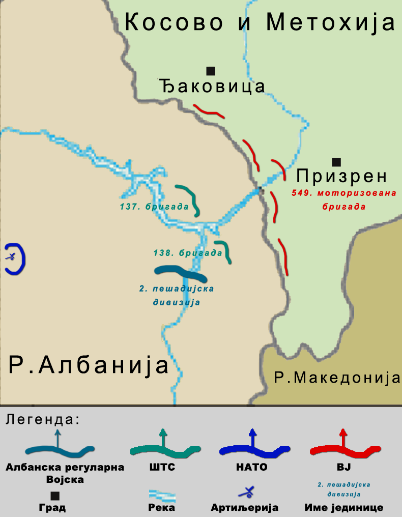 Приближни распоред снага непосредно пред отпочињање операције Стрела.